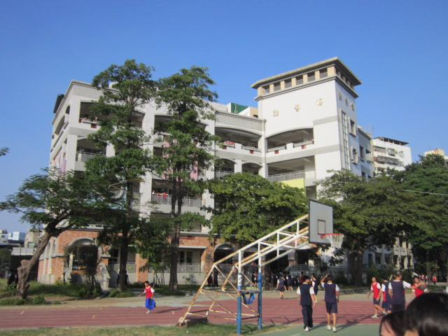 五福國中勤藝樓